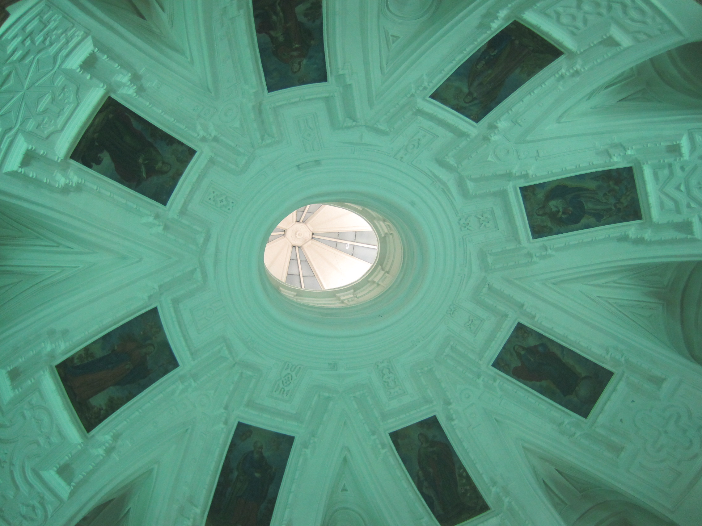 Cúpula de la capilla del Real Colegio de San Albano, Valladolid (España).